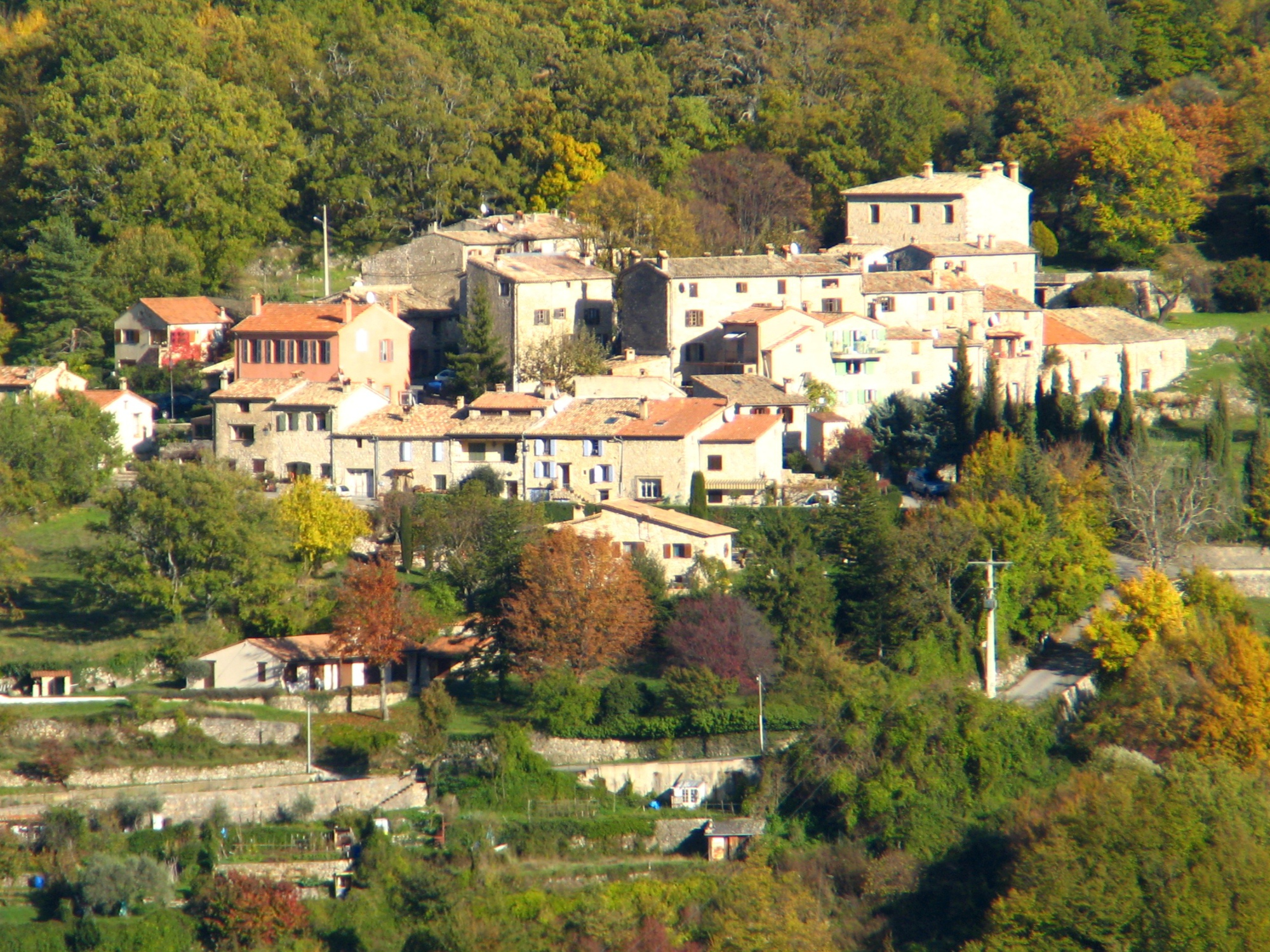 Courmes (Alpes-Maritimes)